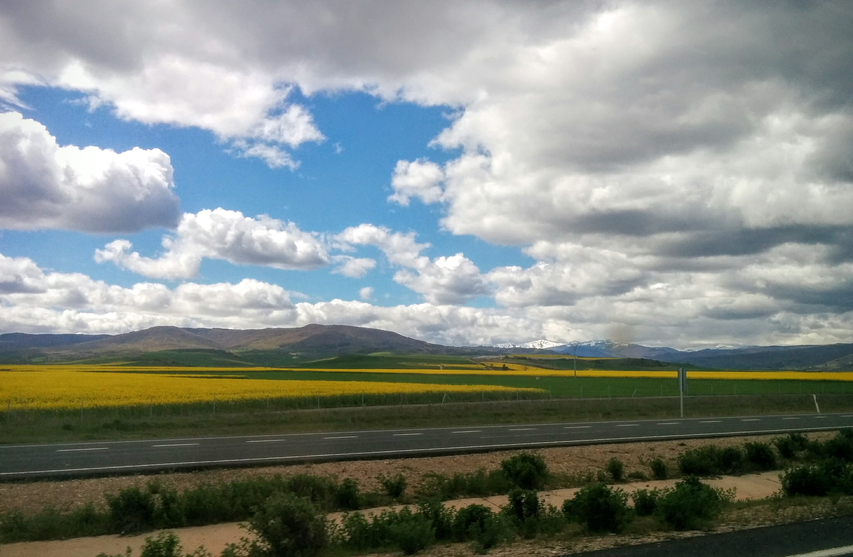 Imagen original